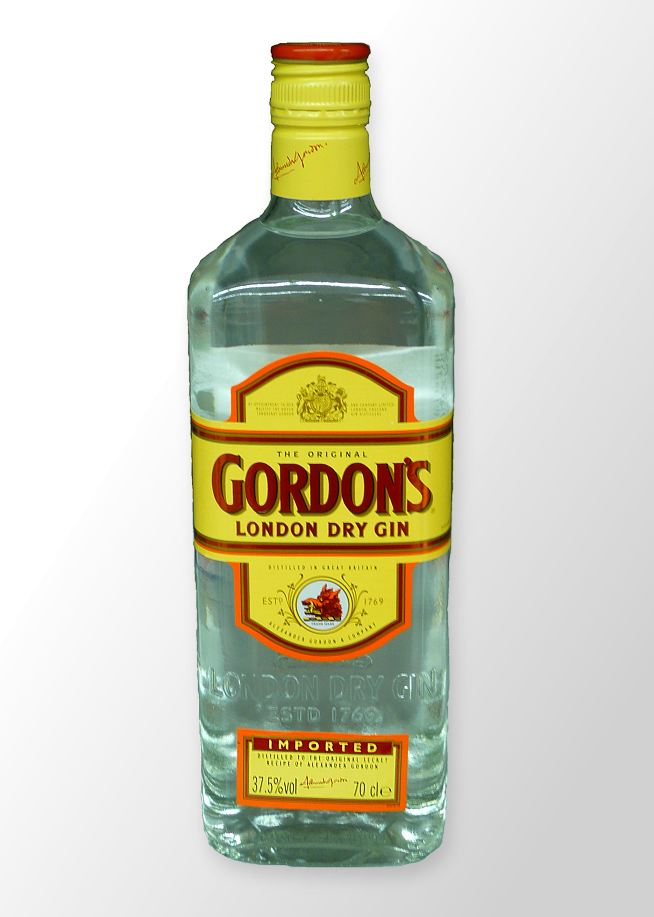 Gordon’s Gin